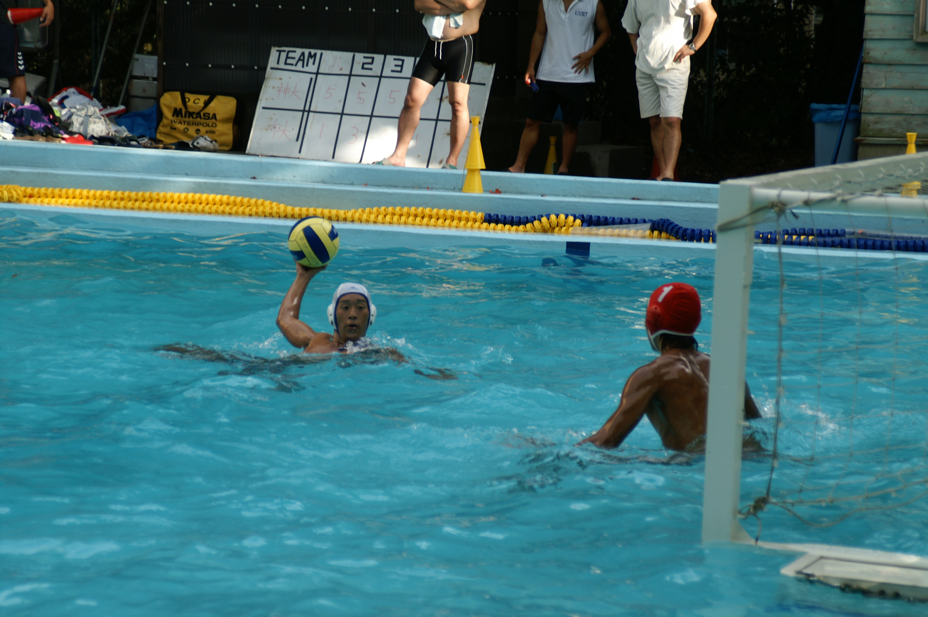 旧三商大戦(水球)＠神戸大学六甲台プール (2006/08/12 Kobe, Hyogo, JAPAN)